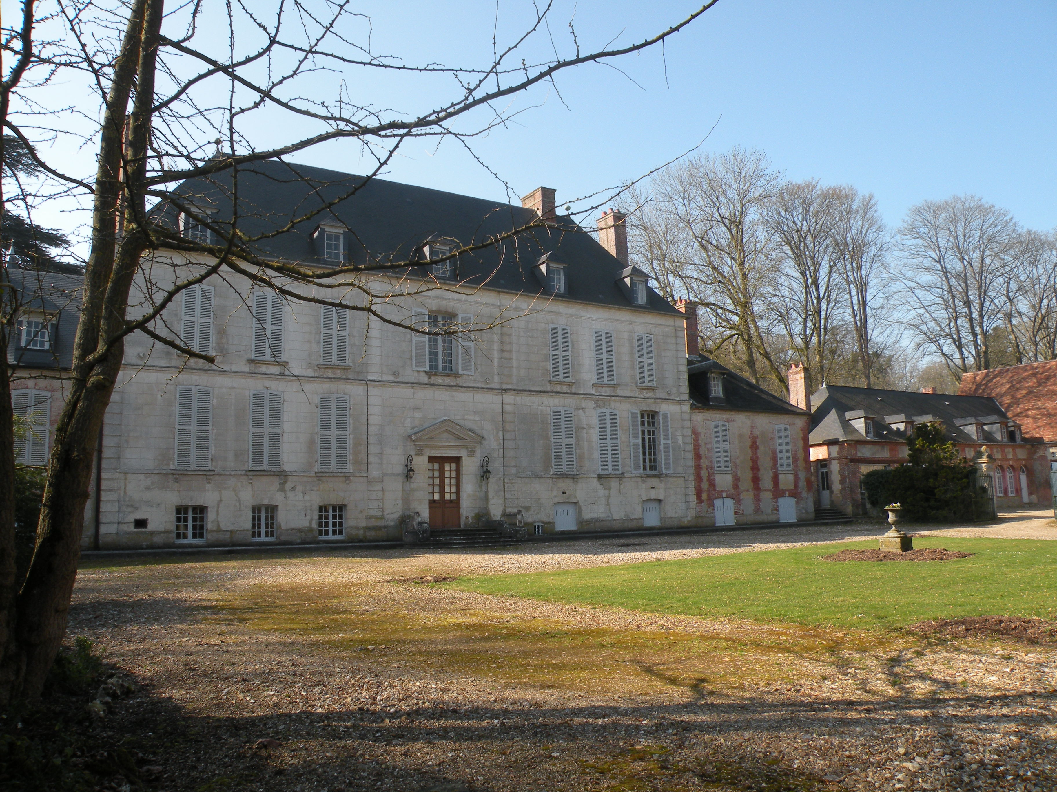 Château Théribus de Le Mesnil-Théribus